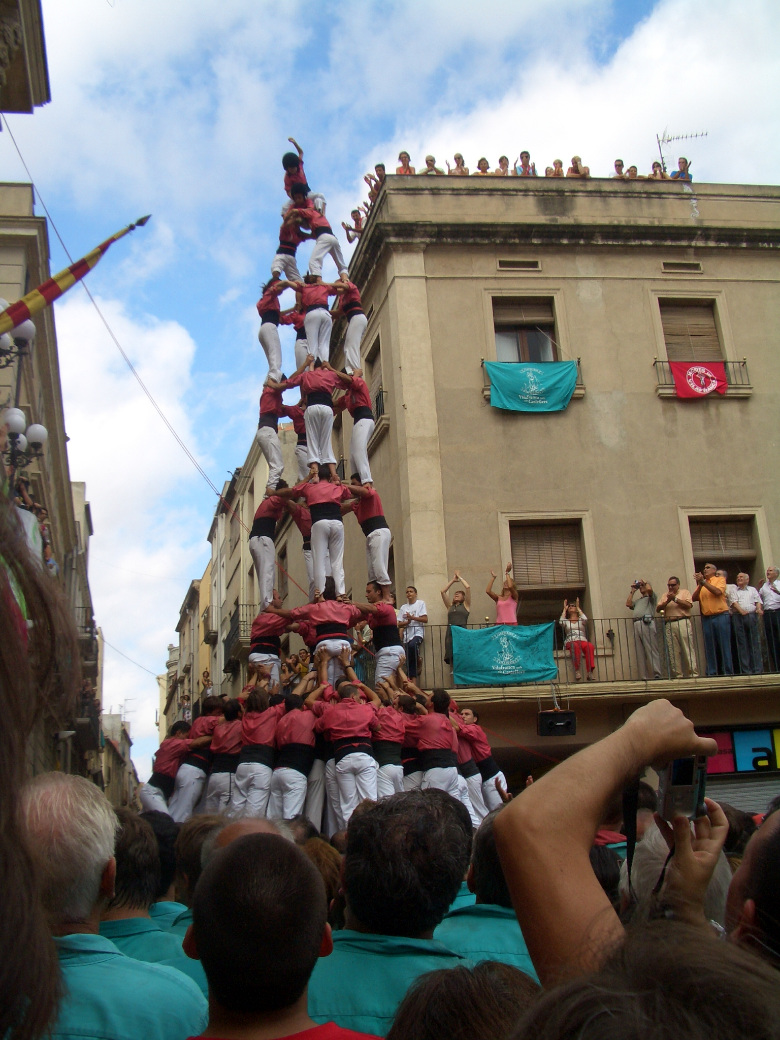 Colla Vella dels xiquets de Valls a Vilafranca per Sant Fèlix. 4 de 9 amb folre.